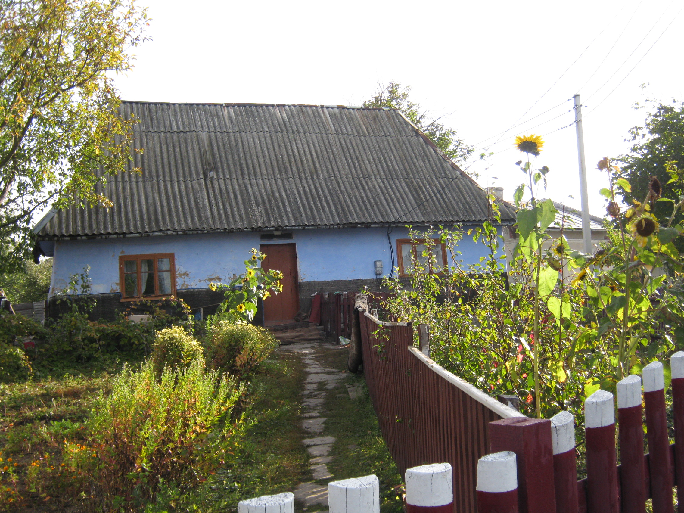 Стара хатина. Бучач-Нагірянка